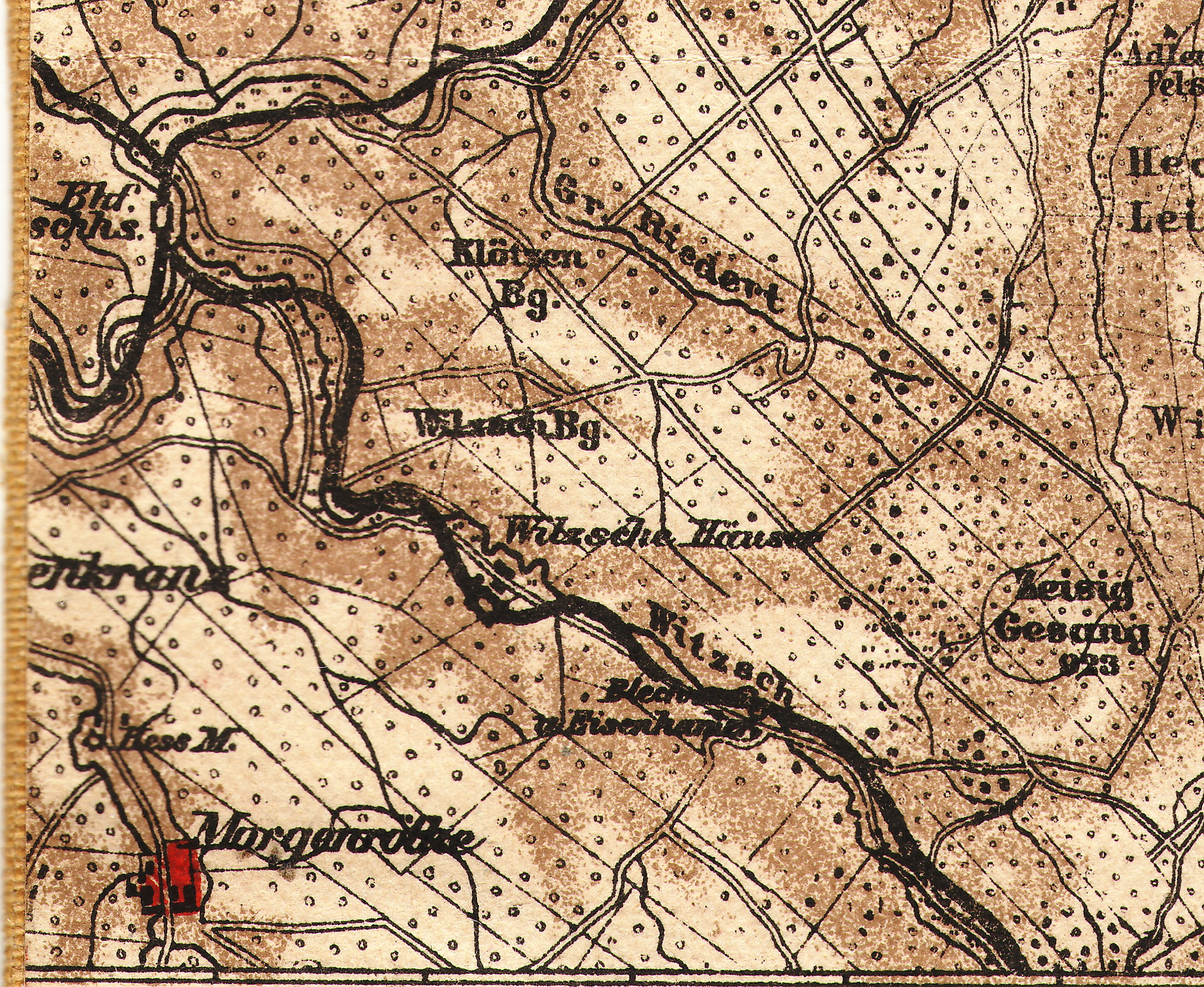 Karte von ca. 1900: Das Wilzschtal östlich von Morgenröthe mit den beiden kleinen Siedlungen "Blech- und Eisenhammer" (das ist Blechhammer) und "Wilzsche Häuser" (das ist Wilzschmühle). Die ebenfalls im Tal der Wilzsch gelegene Siedlung "Neues Wiesenhaus" wird nicht erwähnt, Wilzschhaus nur als "Bhf. Wilzschhaus". Der Kartograph hatte einen schlechten Tag: Die Wilzsch benennt er mit "Witsch".